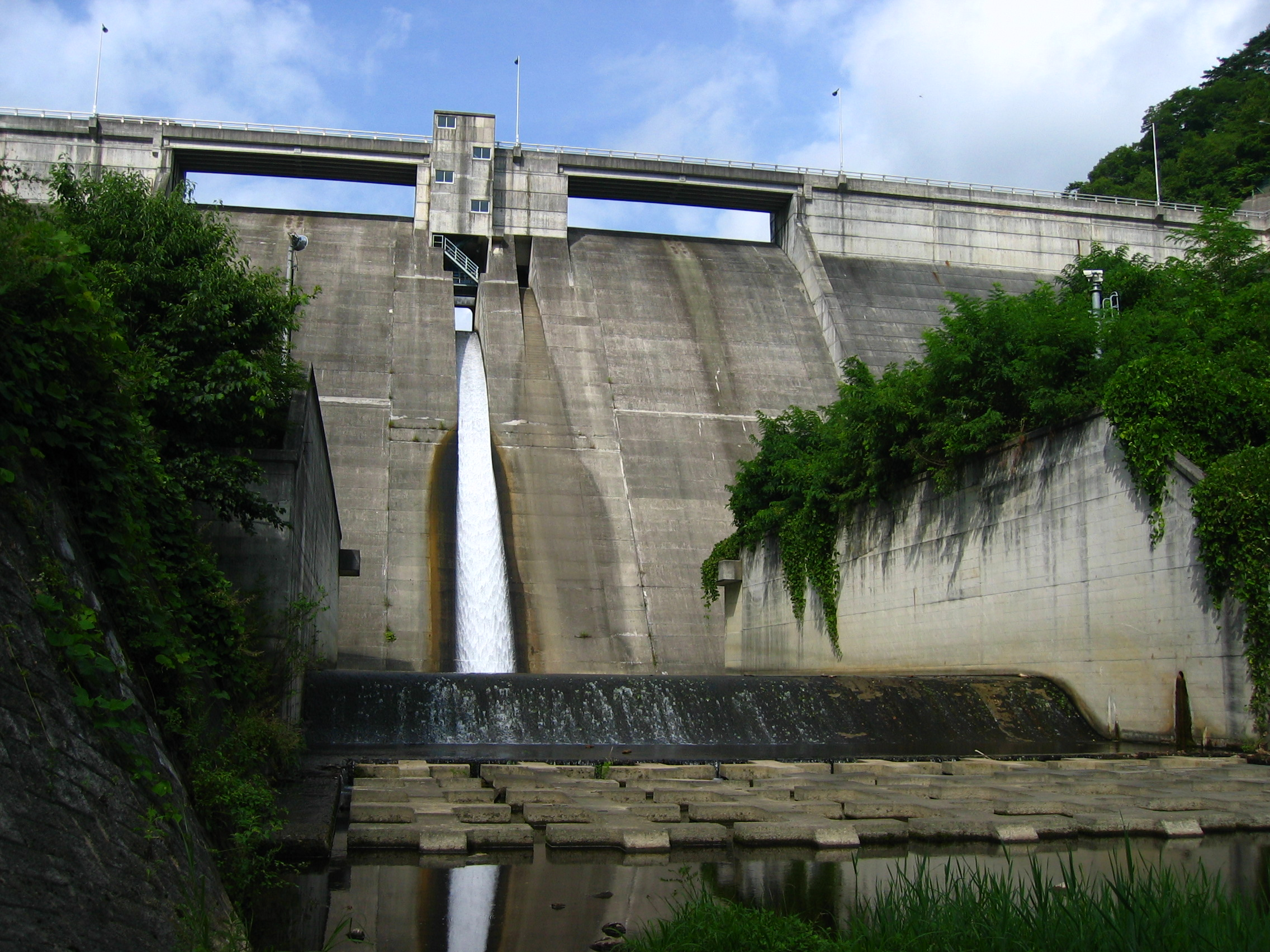 Uchimura Dam (内村ダム) is a dam in Nagano, Japan.